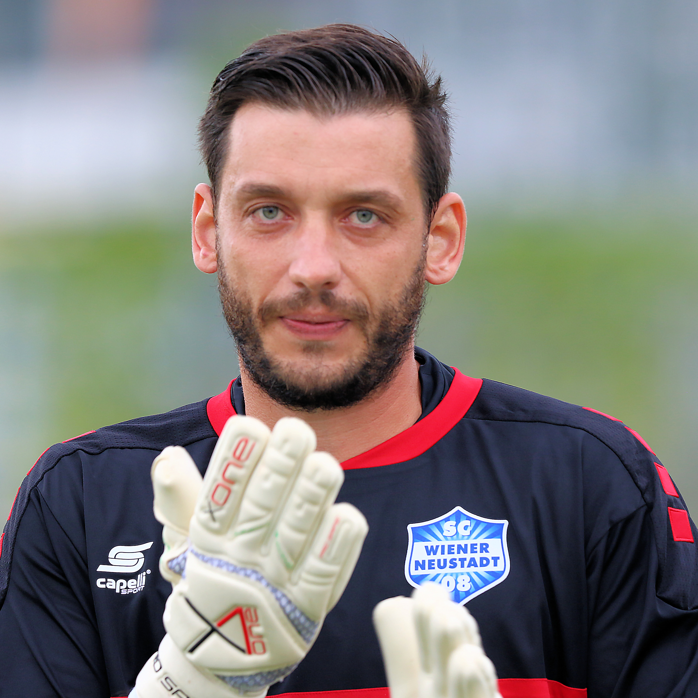 Meisterschaftsspiel der Regionalliga Ost 2019/20 SC Wiener Neustdat (blaue Trikots) gegen SC Team Wiener Linien (rote Trikots) am 3. August 2019 3:1 (0:1). – Das Bild zeigt den Torwart des SC Wiener Neustadt Bartolomej Kuru.